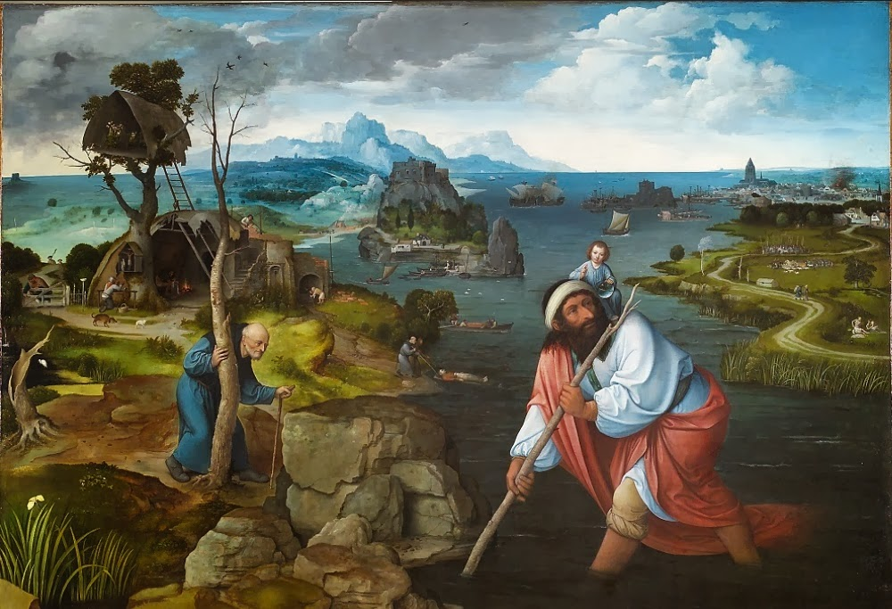 EL lienzo representa a San Cristóbal en un paisaje en el que también aparece el Niño Jesús.